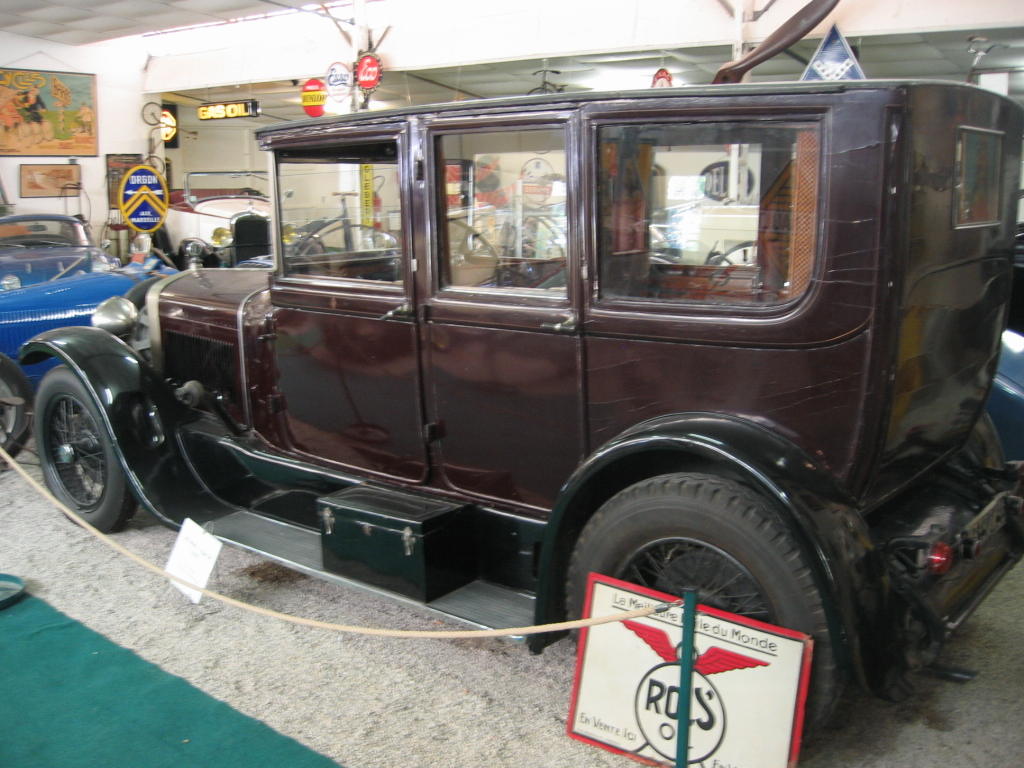 Voiture Delage Type DI